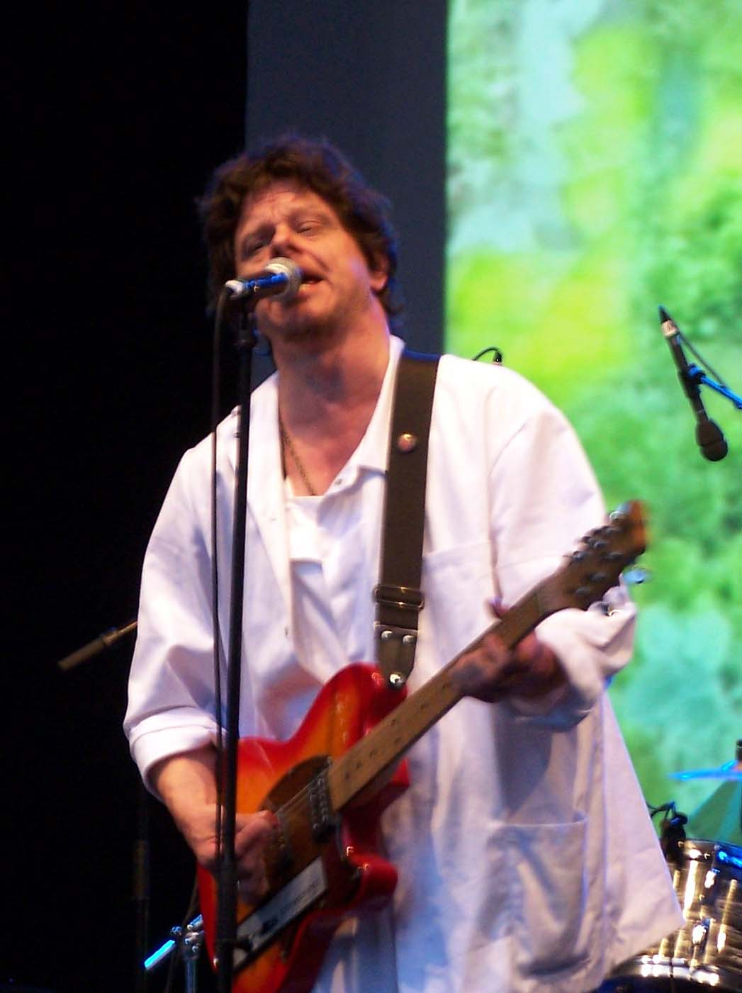 Tom Liwa, 02.06.2007, Zeche Zollverein, Essen